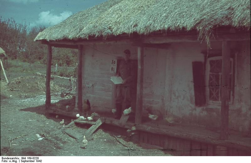 Der Eingang zum Büro des Hauptquartiers der 6. Armee bei Poltawa September 1942